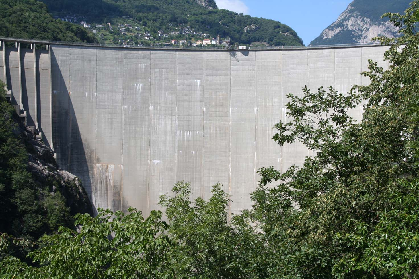 Staumauer des Lago di Vogorno